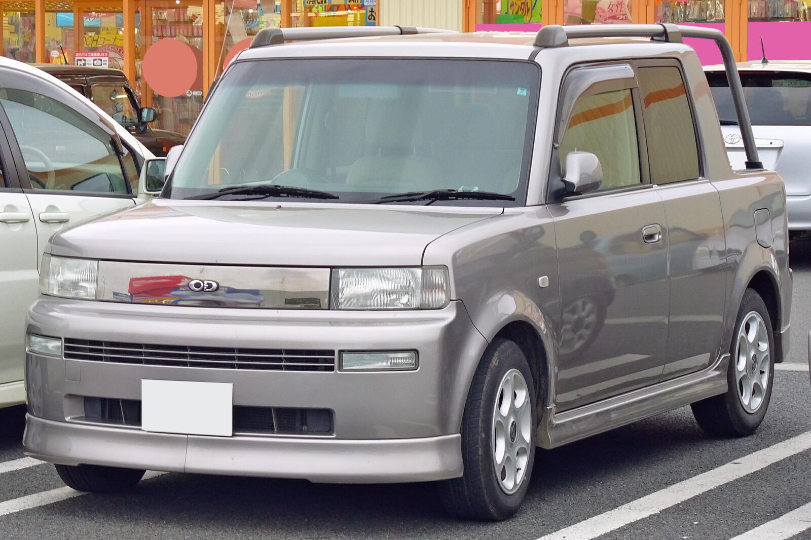 トヨタ・bBオープンデッキ